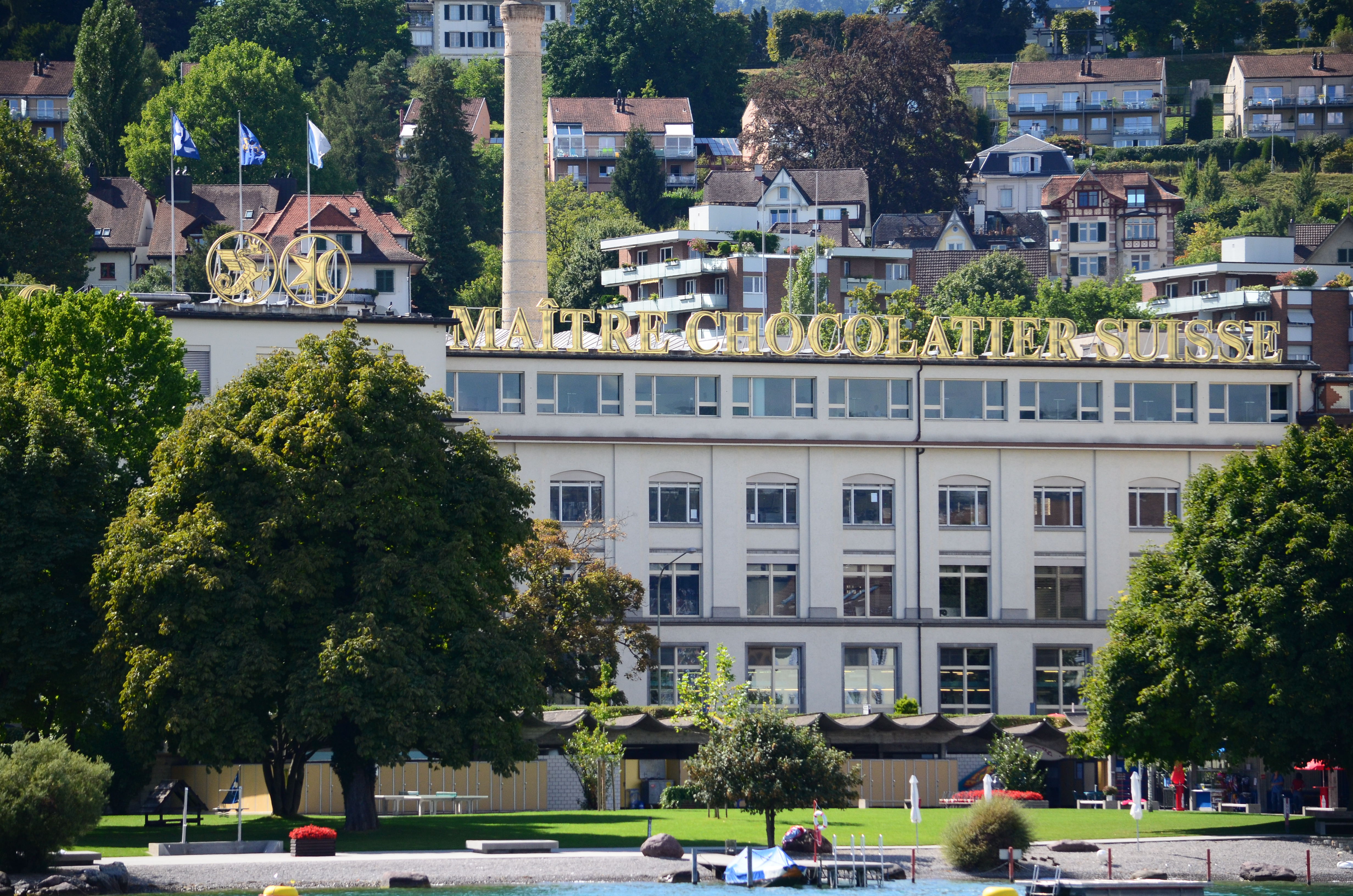 Lindt & Sprüngli in Kilchberg (Switzerland) as seen from Zürichsee-Schiffahrtsgesellschaft (ZSG) MS Pfannenstiel on Zürichsee